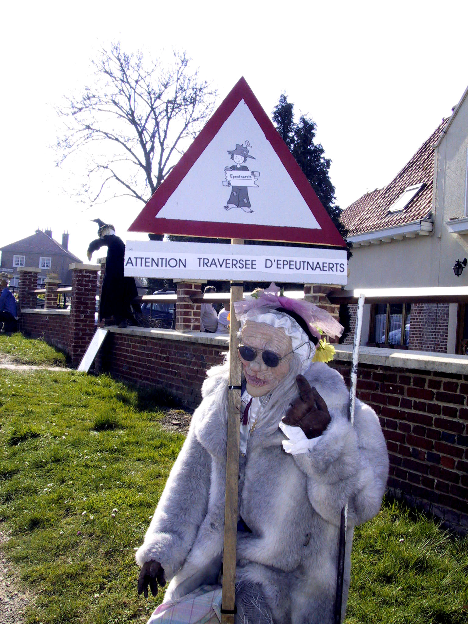 pendant le mois des epeutnaerts à Moringhem